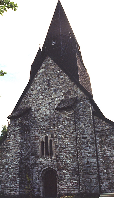 Voss kirke